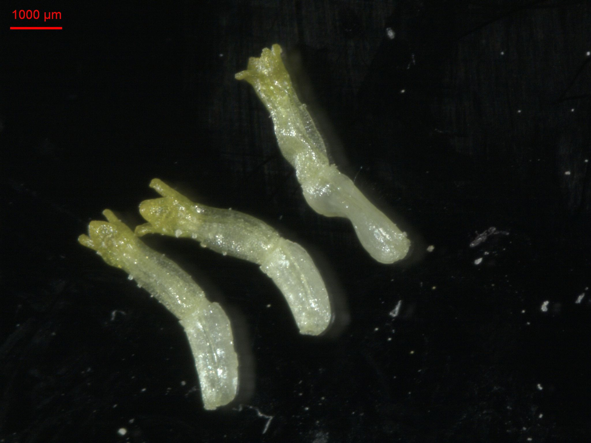 Matricaria discoidea